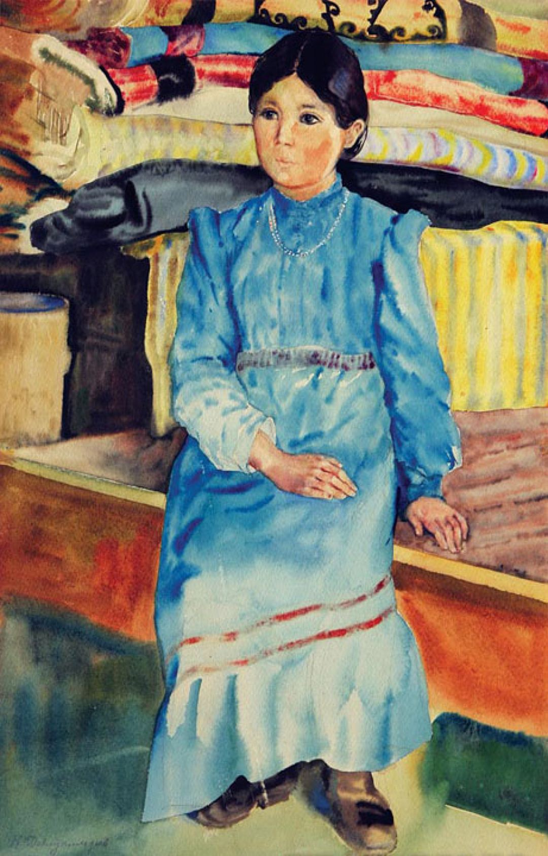 картина художника Девлеткильдеева Касима (1887—1947). Девочка – башкирка в голубом